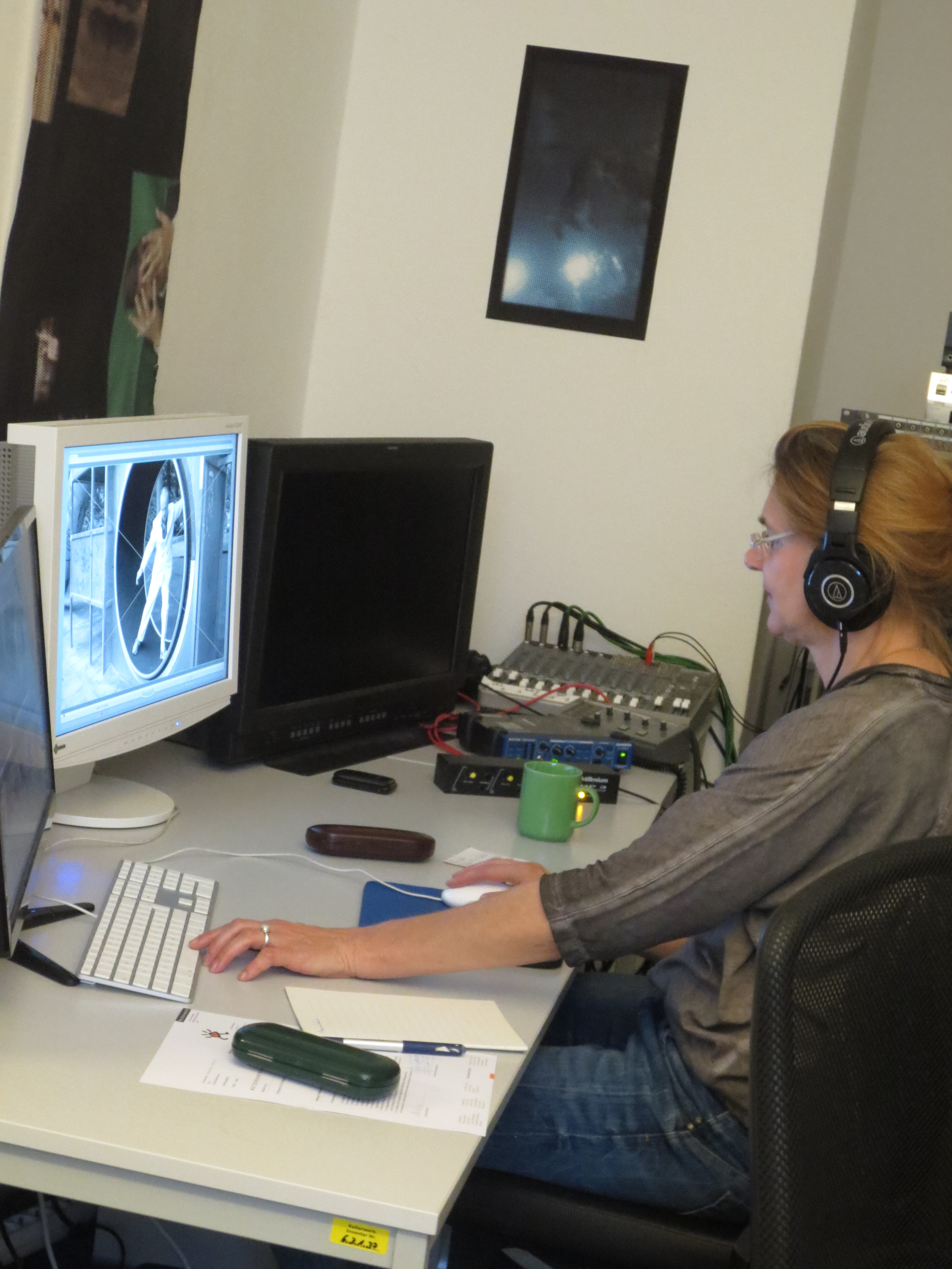 Arbeitsplatz in der Medienwerkstatt